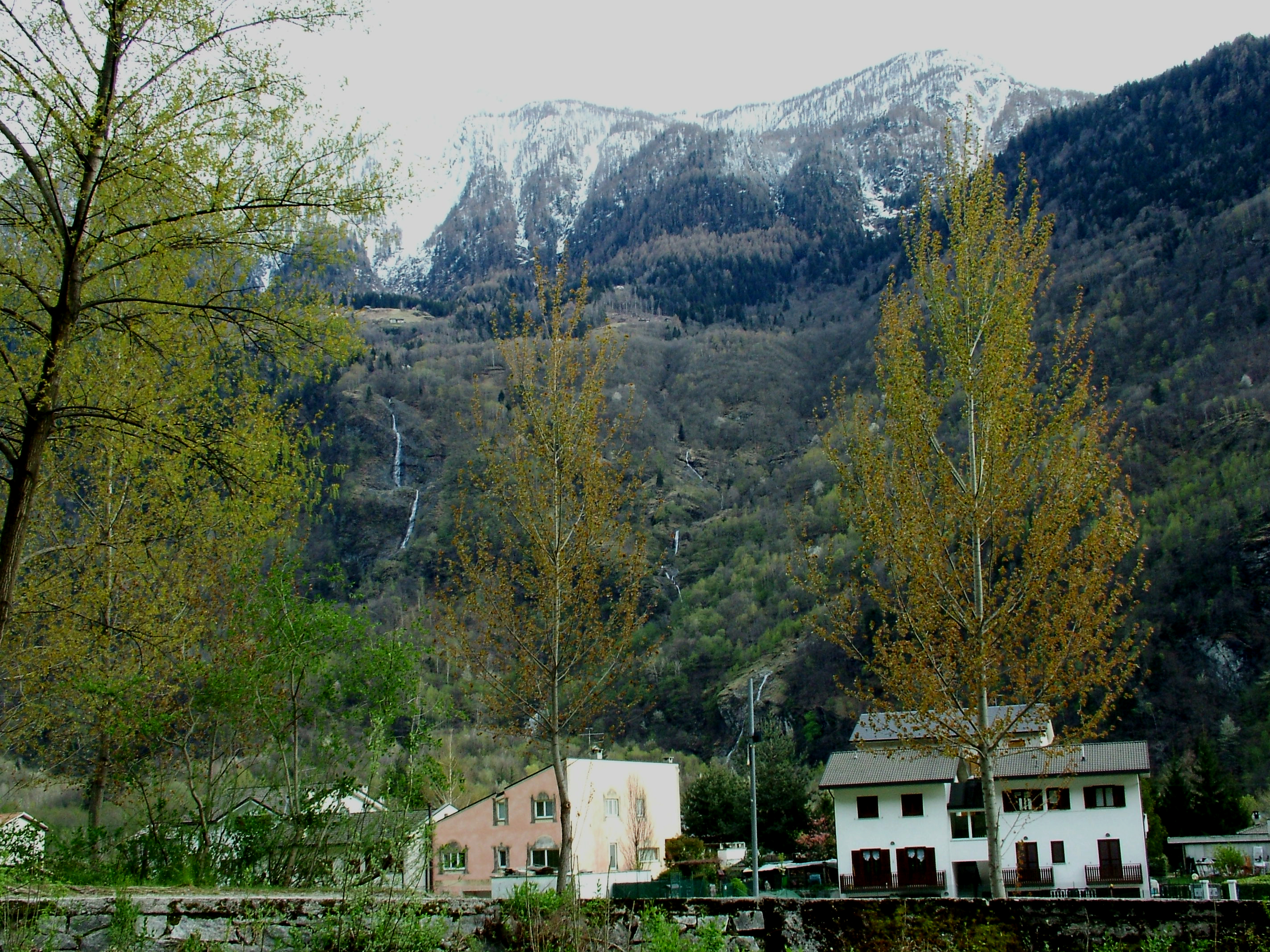 Maloja-hágótól délnyugatra, Chiavenna, Olaszország